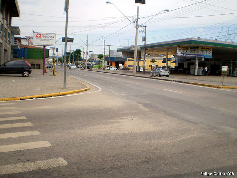 Jundiapeba